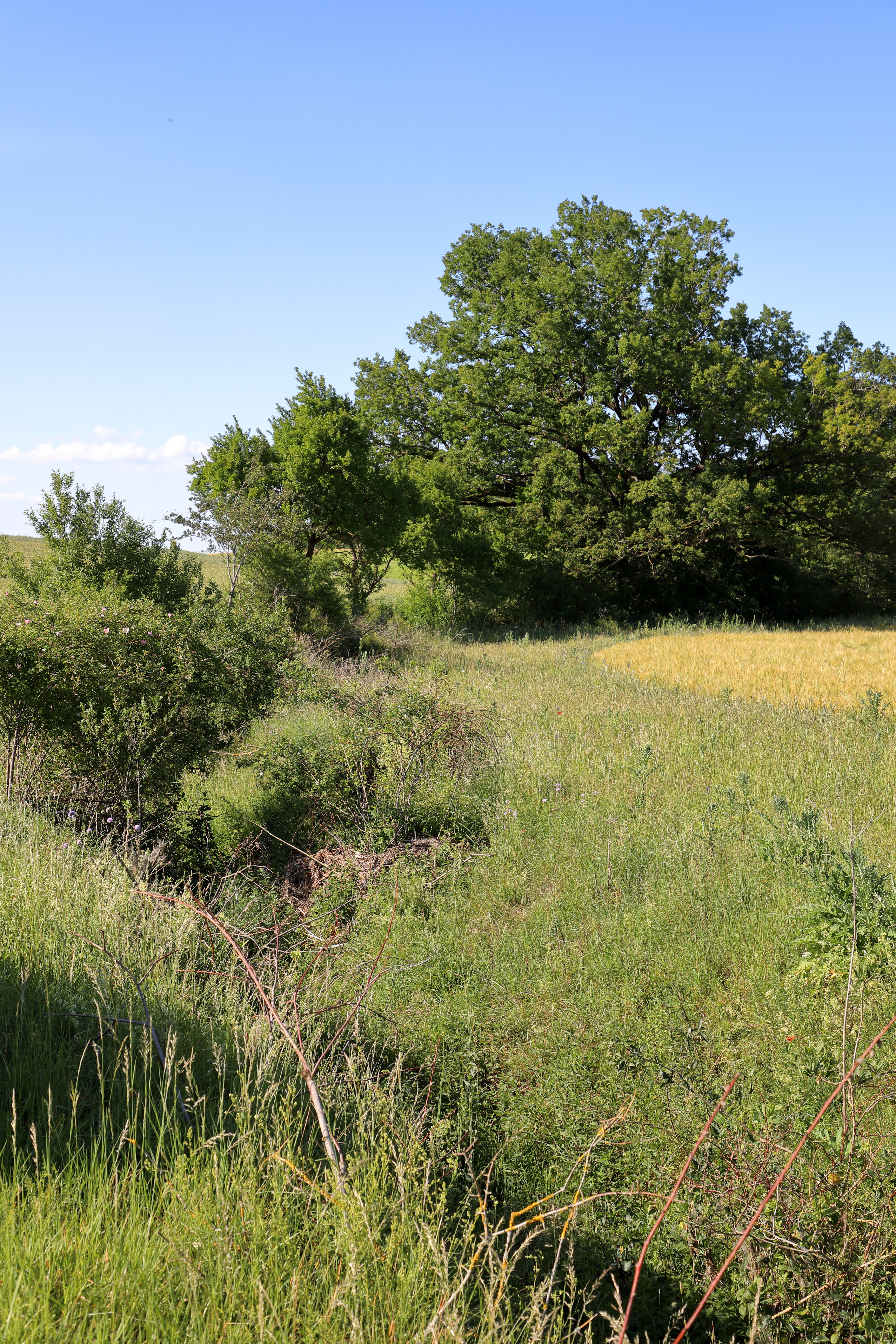 Das Einzelgebilde-Naturdenkmal Traubeneiche Mittlere Klinge mit der ID 81280200018 im Creglinger Ortsteil Oberrimbach. Im Vordergrund der Rimbach (ein Oberlauf des Herrgottsbachs).